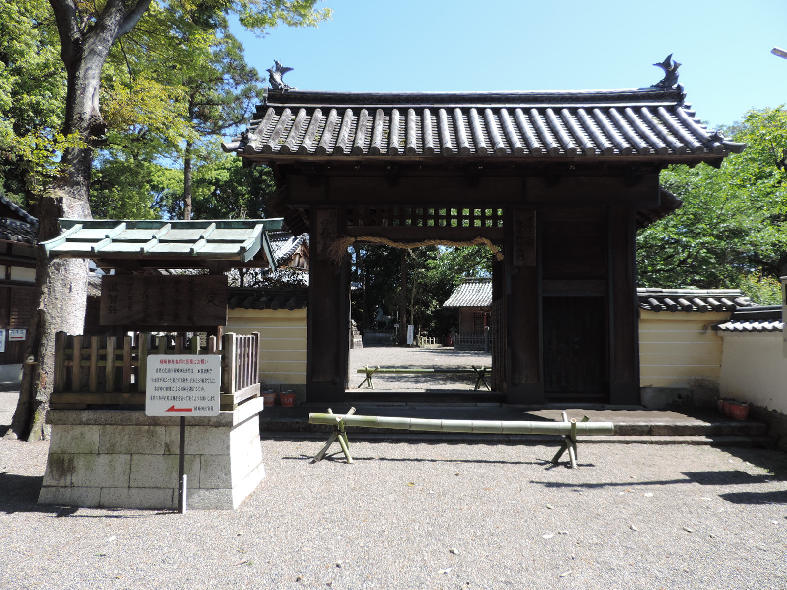 鞭崎八幡宮の正門。膳所城の南大手門を移築したもの。2020年5月撮影。